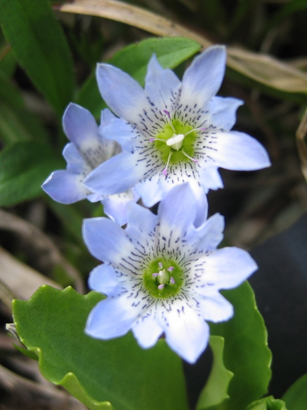 2006年8月4日、利用者自身の撮影、編集。